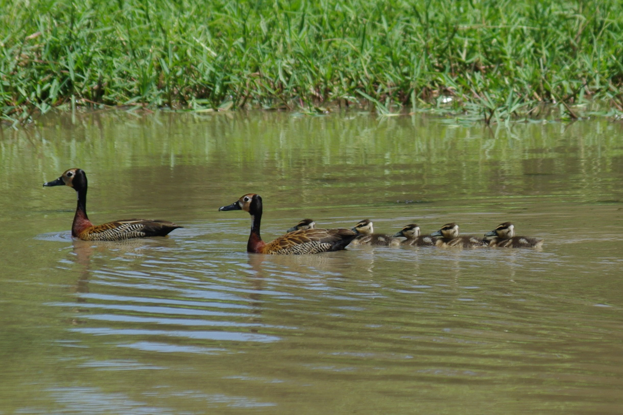 Entenfamilie am Fluss, KNP